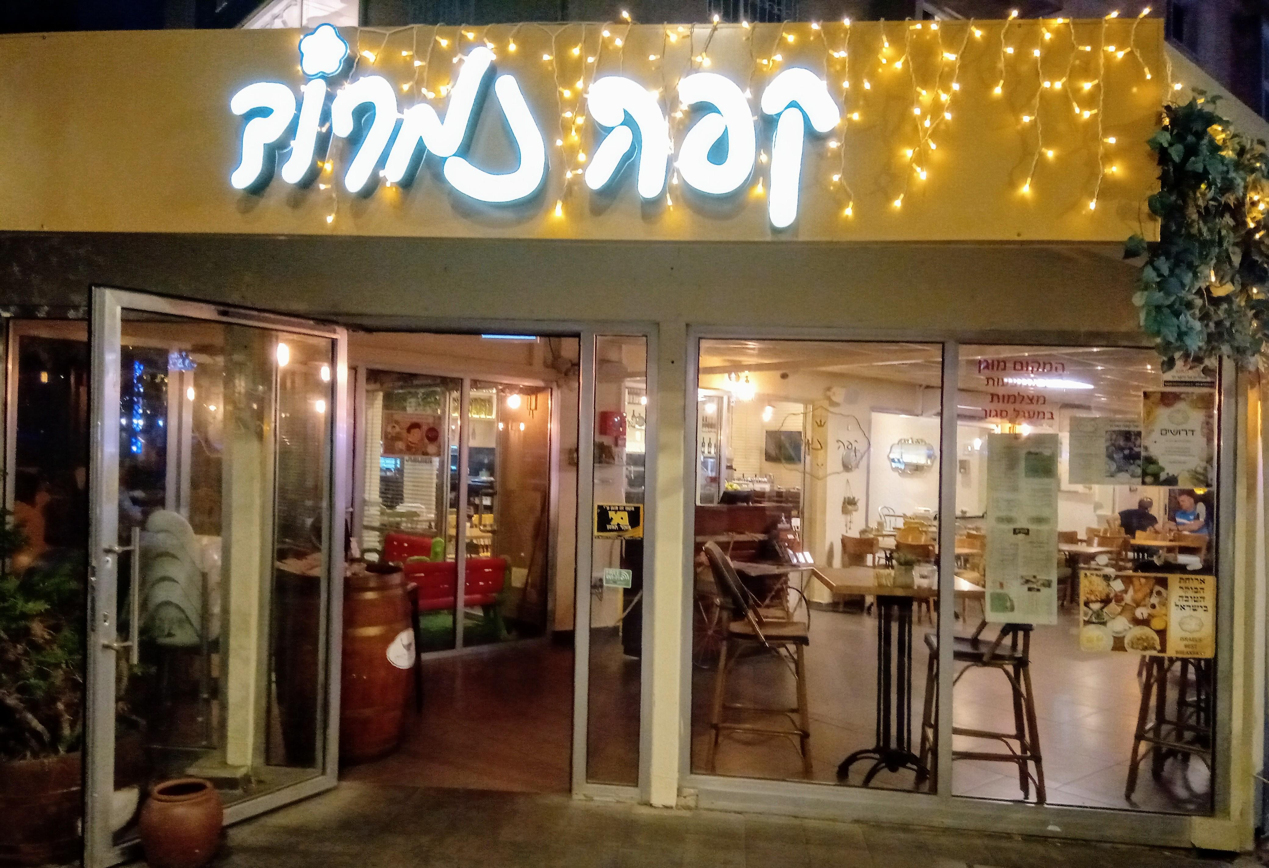 קפה נמרוד, מרכז הכרמל חיפה